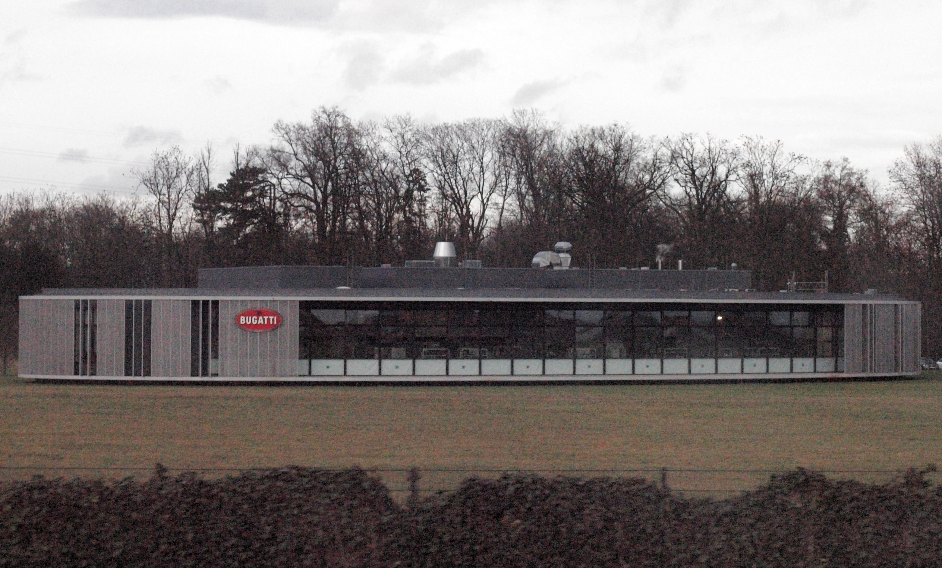 Fabrikgebäude der Bugatti Automobiles in Molsheim/Elsass in Frankreich